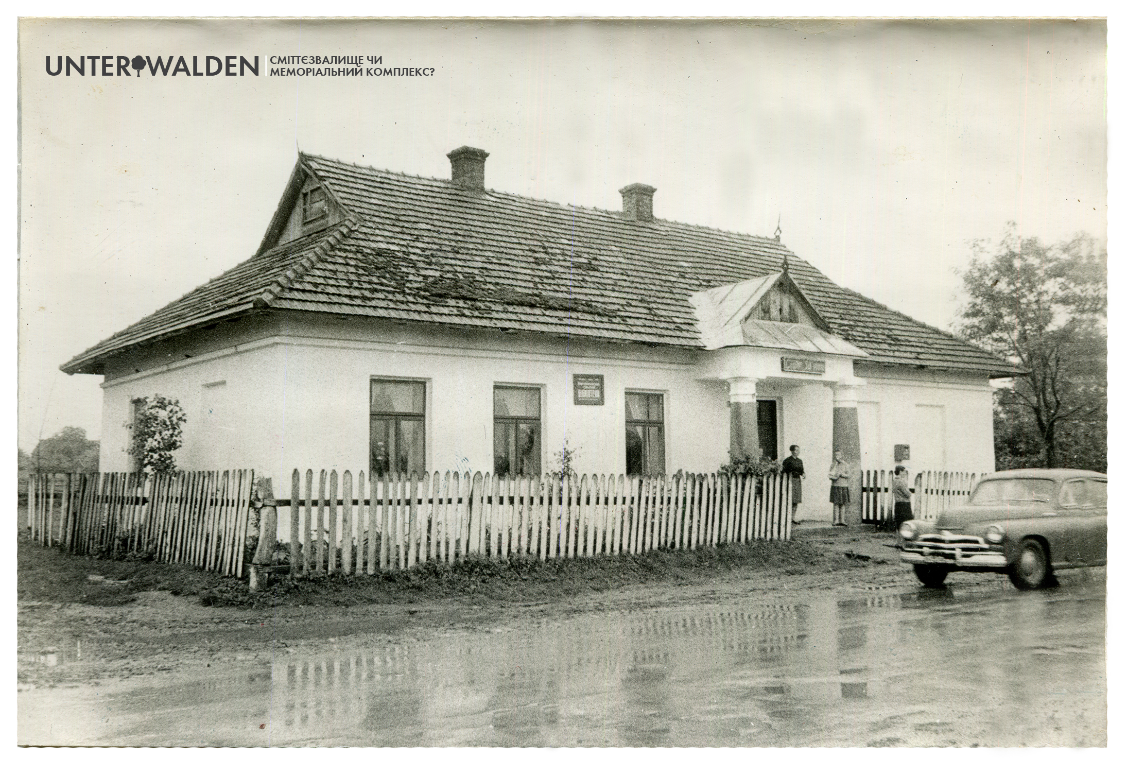 Фото 1950-х років. У той час там розташовувалась сільська бібліотека. Німцям ця будівля служила як приміщення молочної коопрперативи. Ймовірно, там розташовувався і магазин